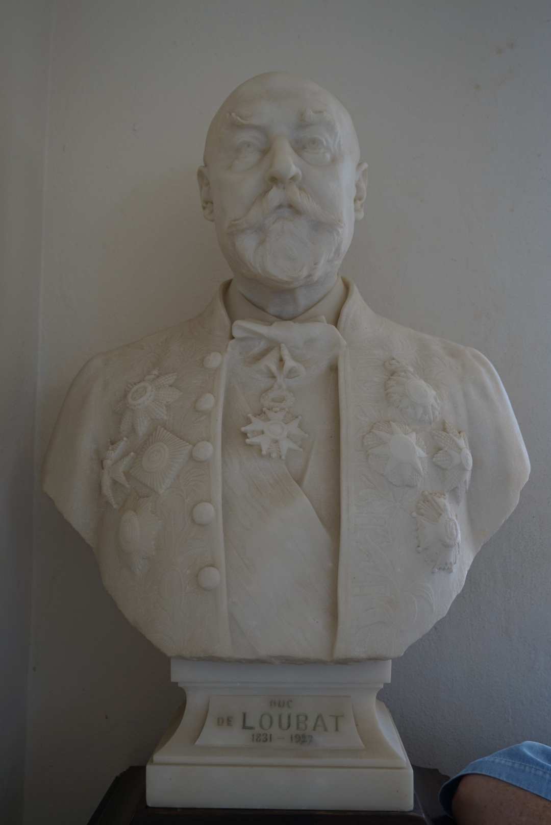 Buste du duc de Loubat, musée archéologique de Délos, Cyclades, Grèce.